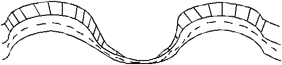 Esquema de un pliegue laminado.